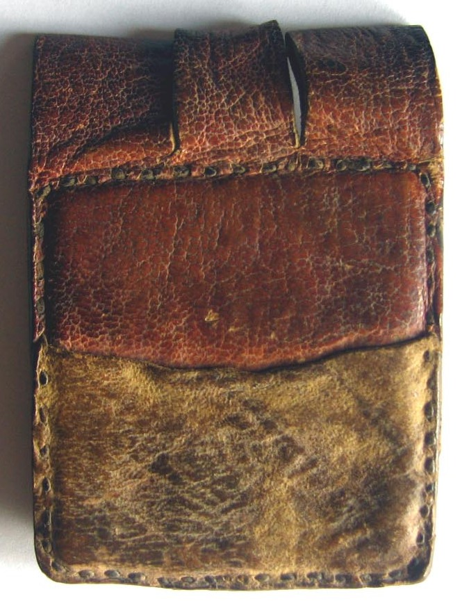 Grisgrís tuareg del Sahel. Fotografía de un grisgrís obtenido en Agadez, Níger, en octubre de 1985.